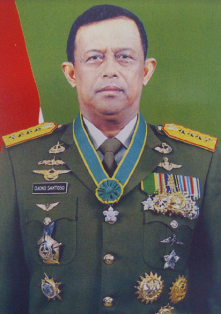 Foto Jenderal TNI Djoko Santoso sebagai Panglima TNI Kategori:Panglima Tentara Nasional Indonesia